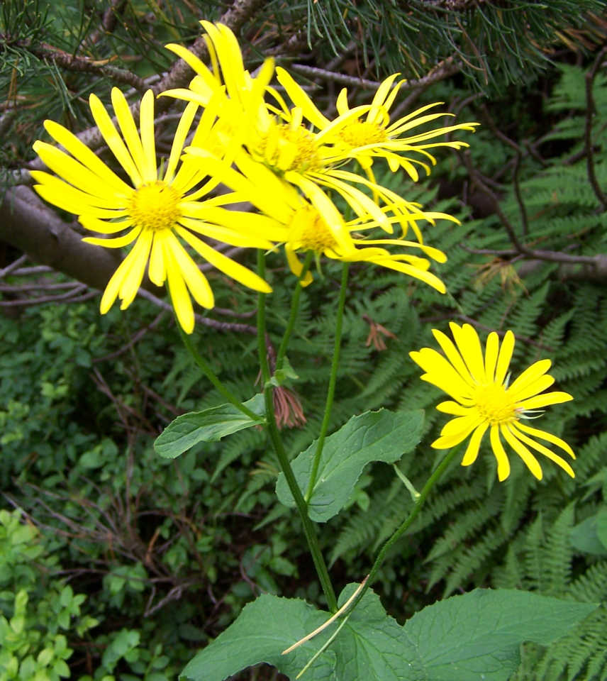 Doronicum austriacum (pl. omieg górski), habitat: Tatra Mountains, Dolina Kondratowa